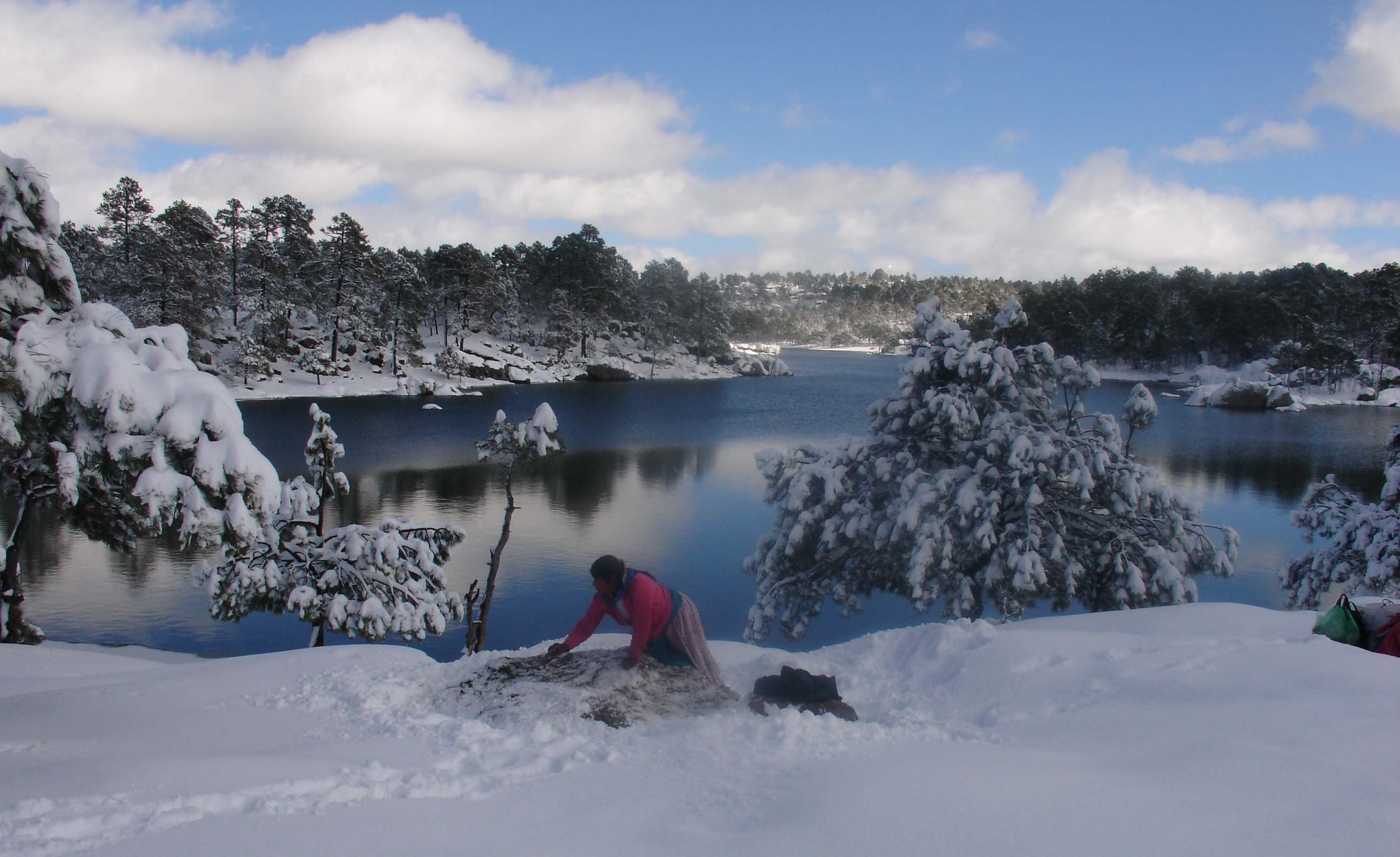 Mujer Tarahumara